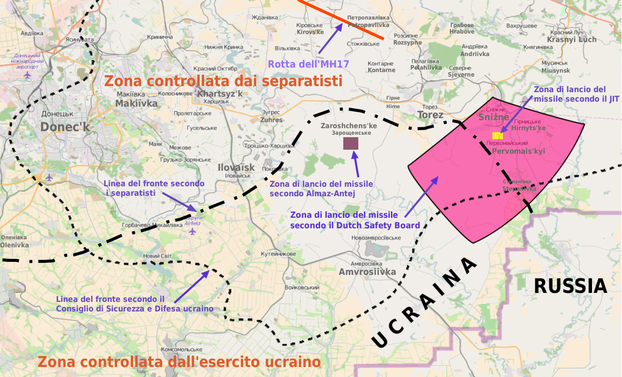 Volo Malaysia Airlines 17: rotta del volo, linea del fronte, zona di lancio del missile secondo Onderzoeksraad voor Veiligheid, Almaz-Antej e JIT. Dati da Onderzoeksraad voor Veiligheid, Almaz-Antej, JIT, BBC, New York Times, Rusvesna, National Security and Defense Council of Ukraine. Mappa derivata da OpenStreetMap.